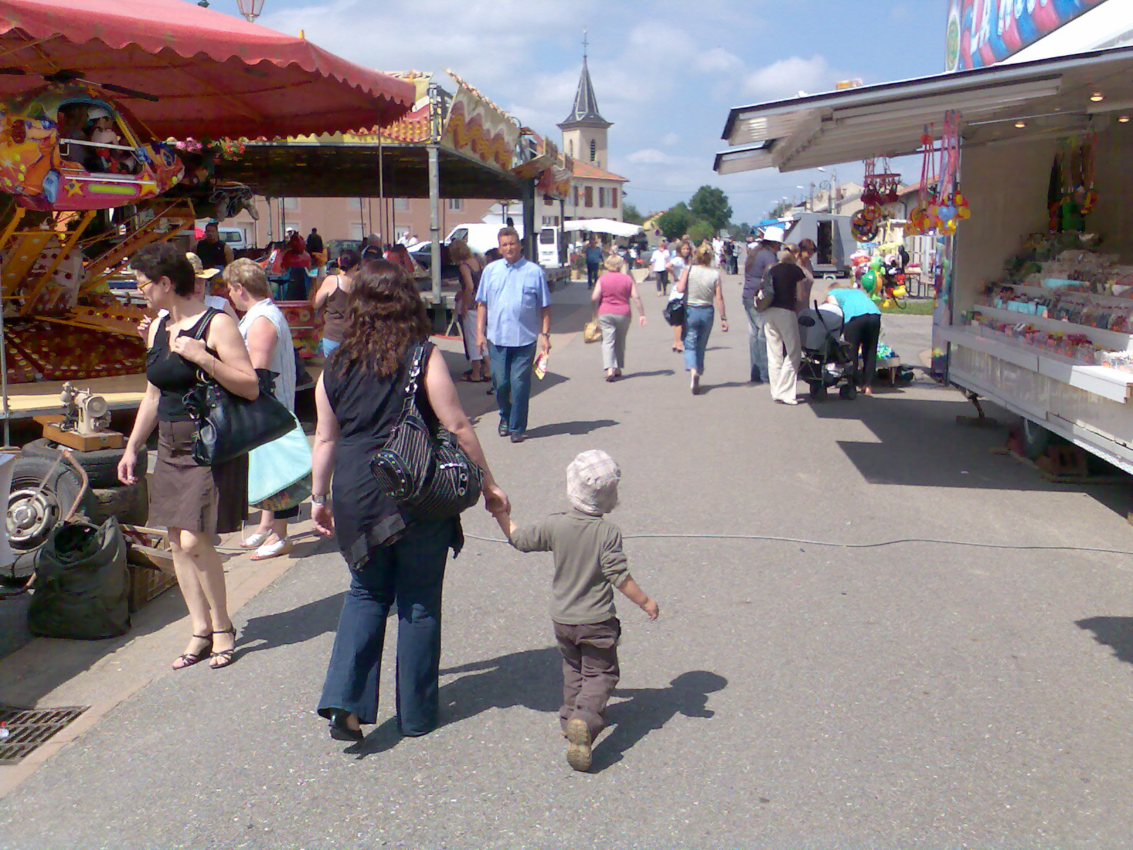 Fête patronale à Lemud, le 29 juin 2008.